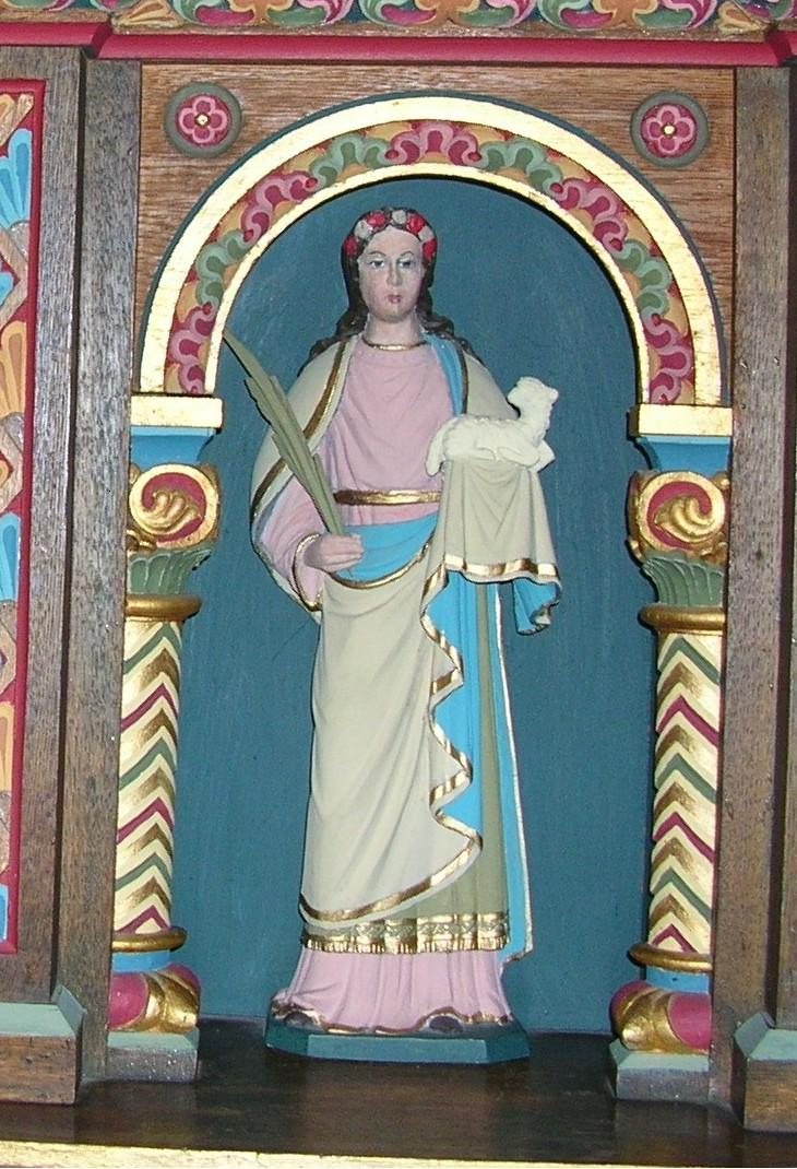 St. Josef Church Sehnde-Bolzum (Germany): St. Agnes